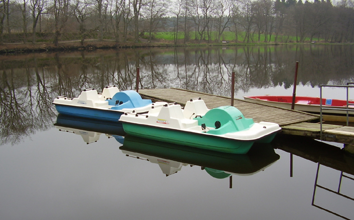 Tretboote/Pedal boats